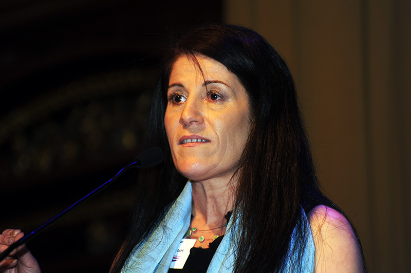 Sara Mohammad at Fadimedagarna 2015 in Stockholm.